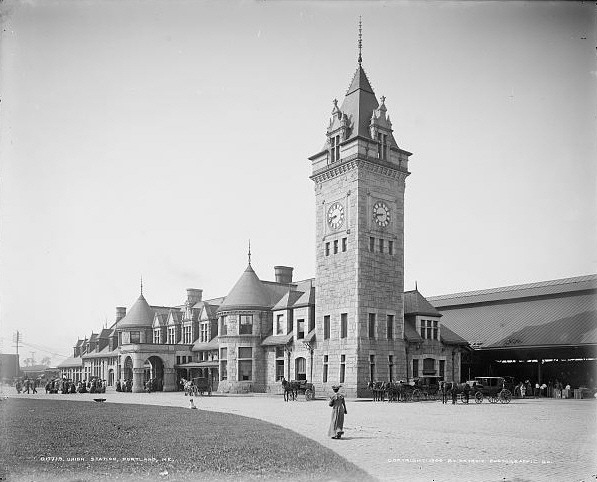 Gare d'Union à Portland au Maine